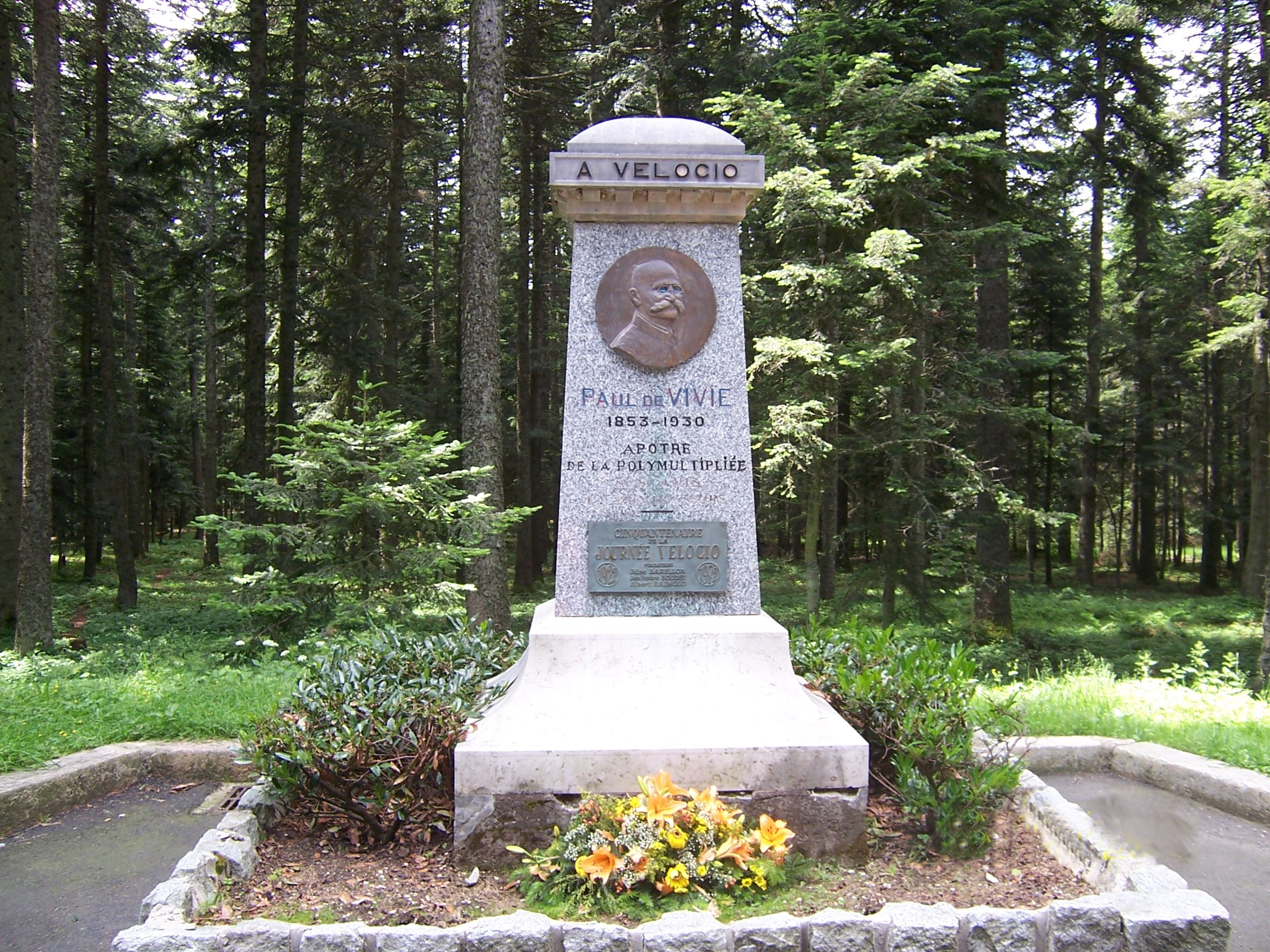 monument dedié à Velocio col de la republique